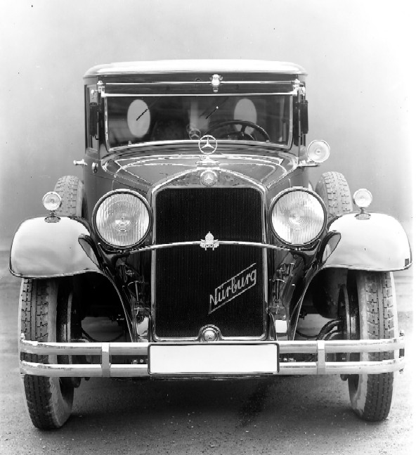 Bildbeschreibung: Mercedes-Benz Typ Nürburg 460 Quelle: Mediaseite der DaimlerChryslerAG Genehmigung: Gern können Sie für Ihre Tätigkeit für die Wikipedia Inhalte der DaimlerChrysler Medienseiten verwenden. Dazu erkennen wir die Bedingungen nach GNU-FDL an. Das Angebot bezieht sich auch auf die vorhandenen Bilder.(Dr.Josef Ernst, Communications, DaimlerChrysler AG)